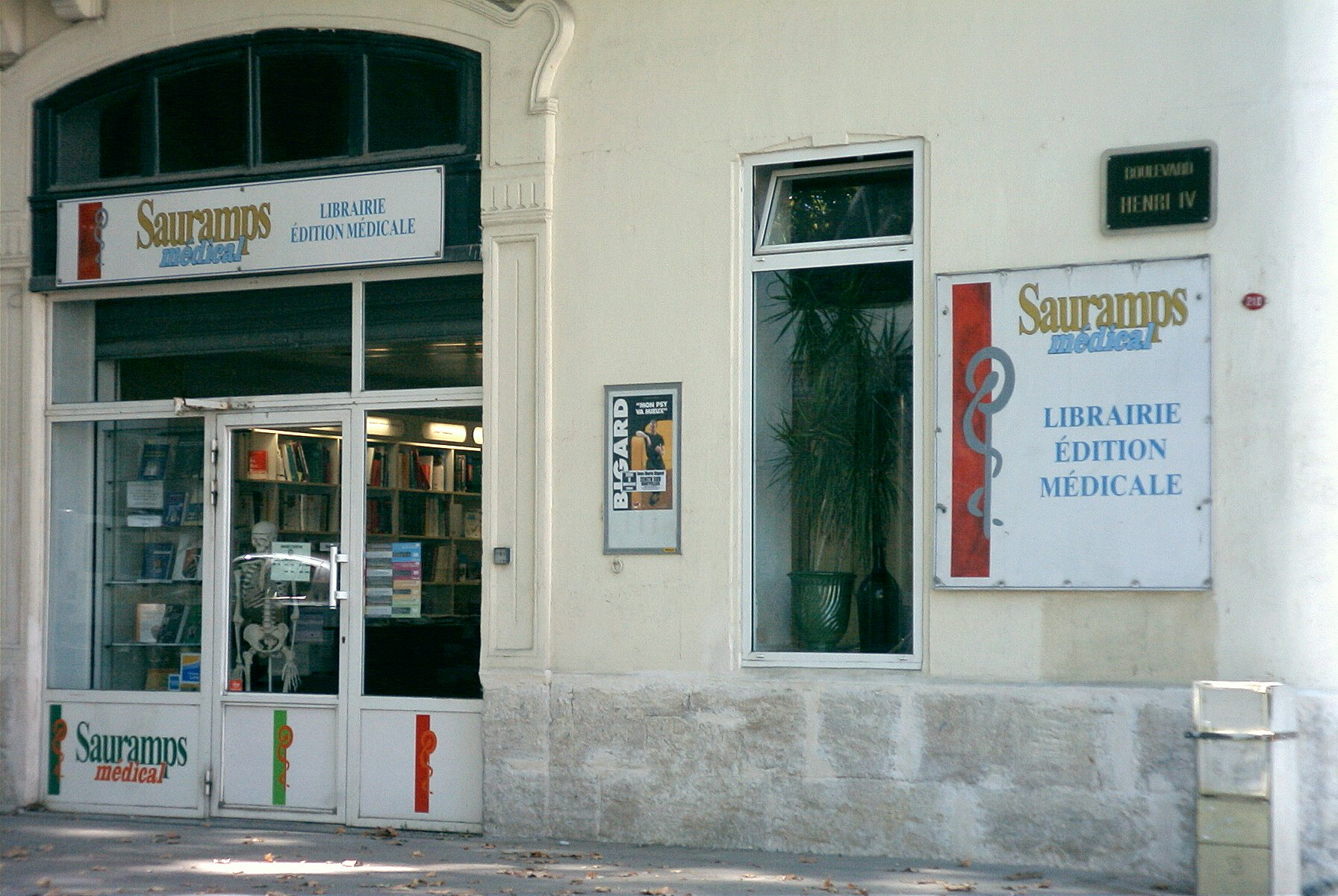 Vitrine de la librairie Sauramps Médical à Montpellier (Hérault, France).